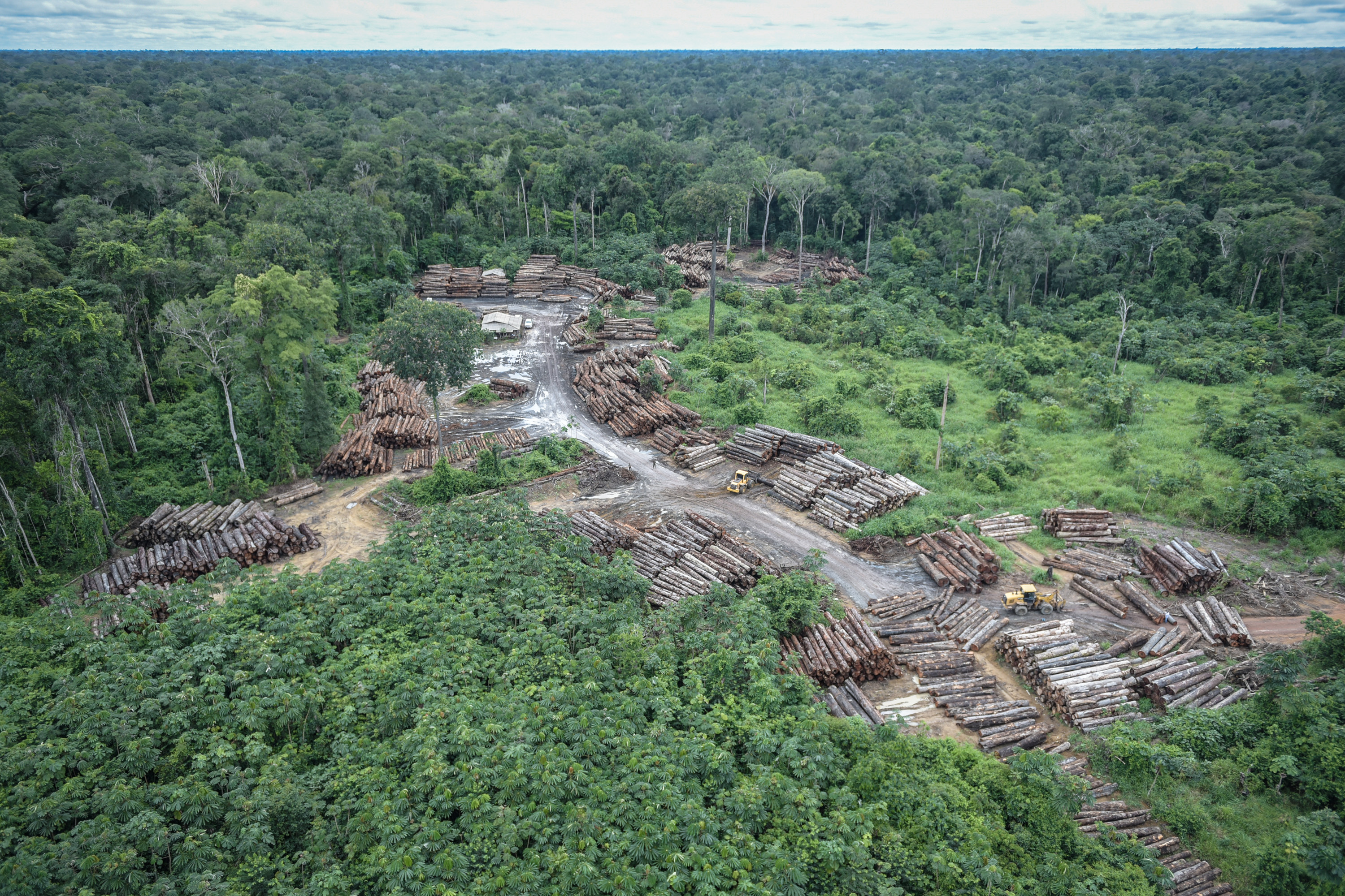 Ibama combate desmatamento ilegal na Terra Indígena Pirititi, Roraima Foto: Felipe Werneck/Ibama Mais informações